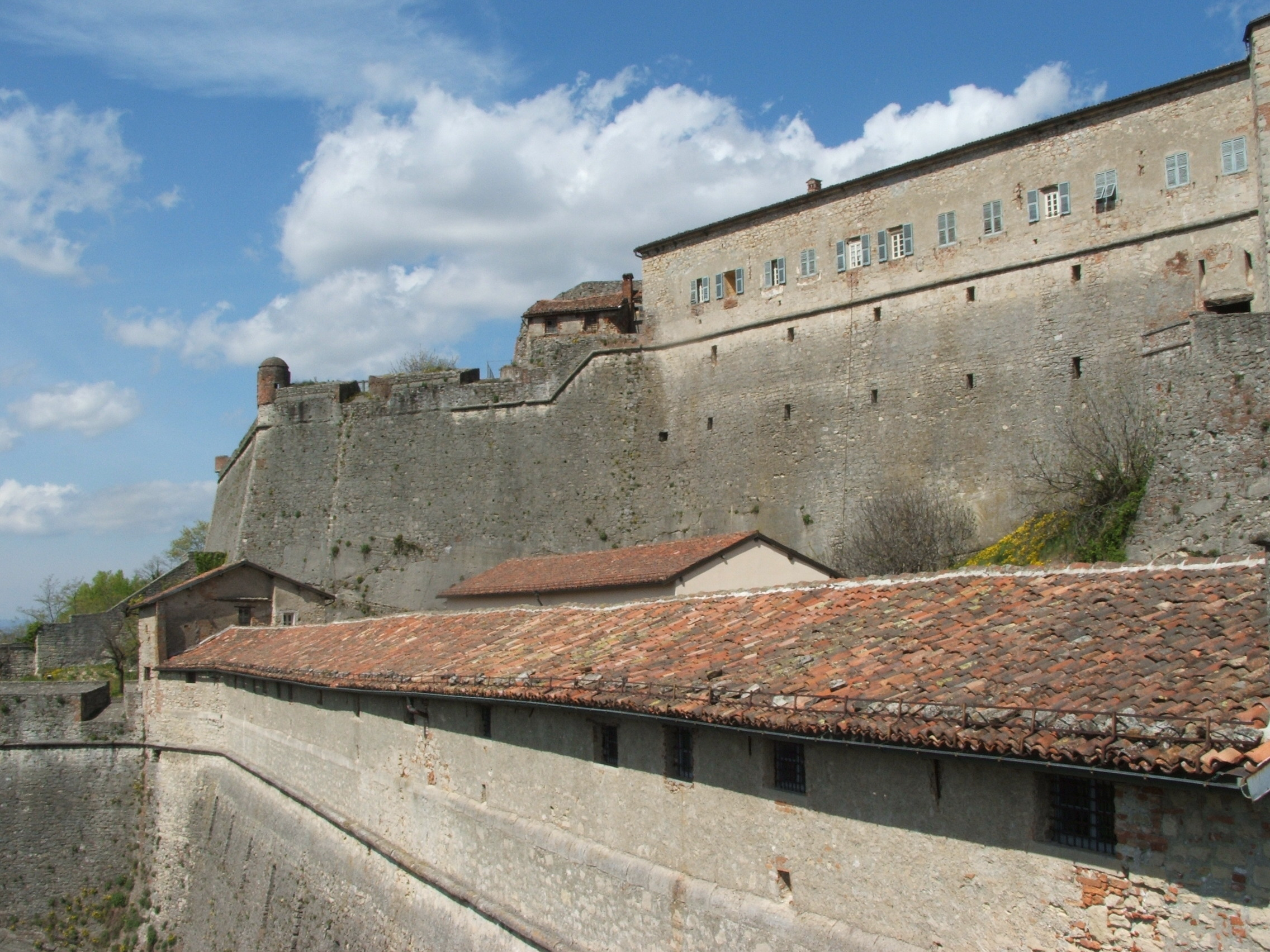 Forte di Gavi, Gavi, Piemonte, Italia